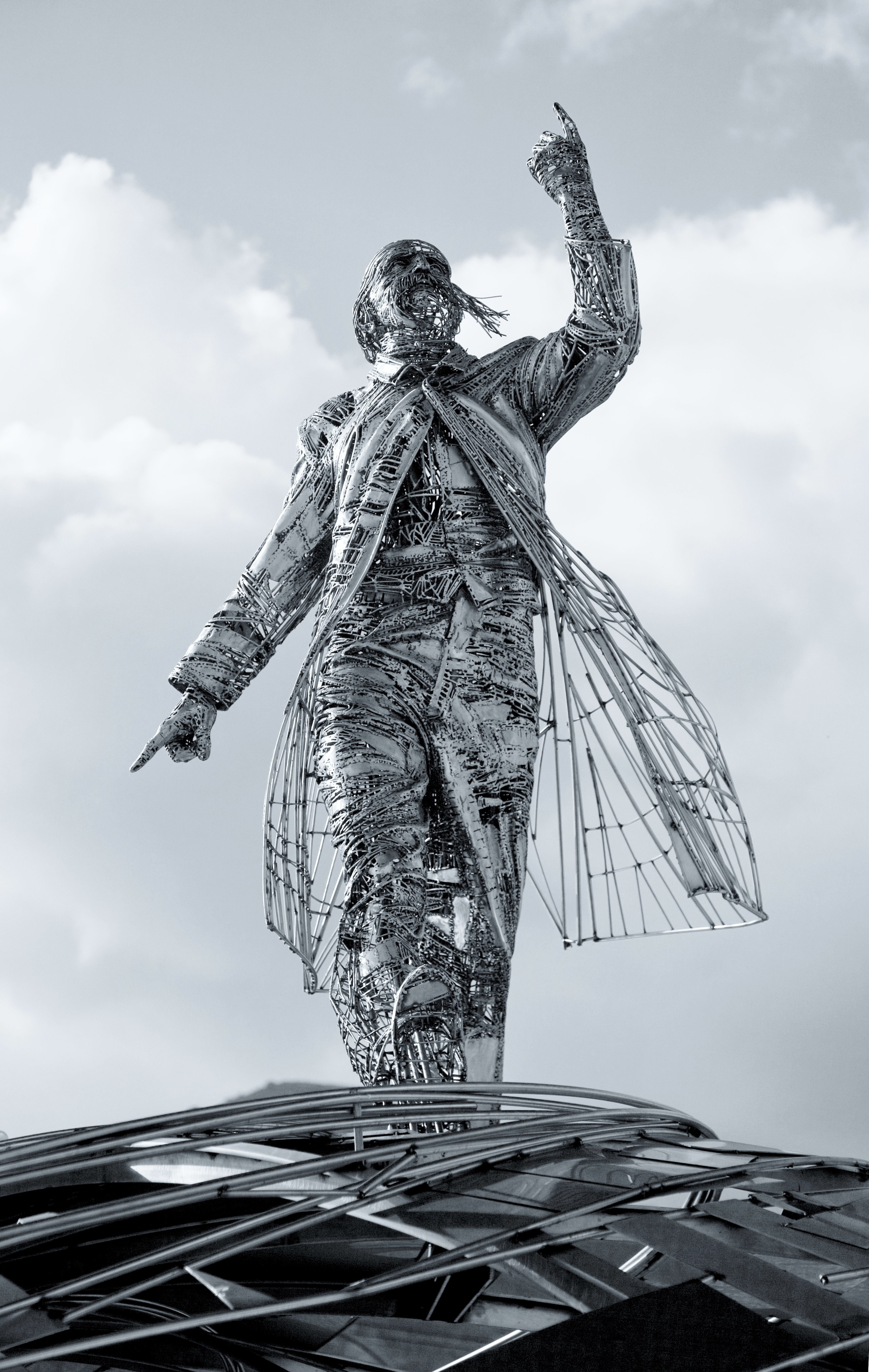 Monumento Ildefons Cerdà - Jordi Díez